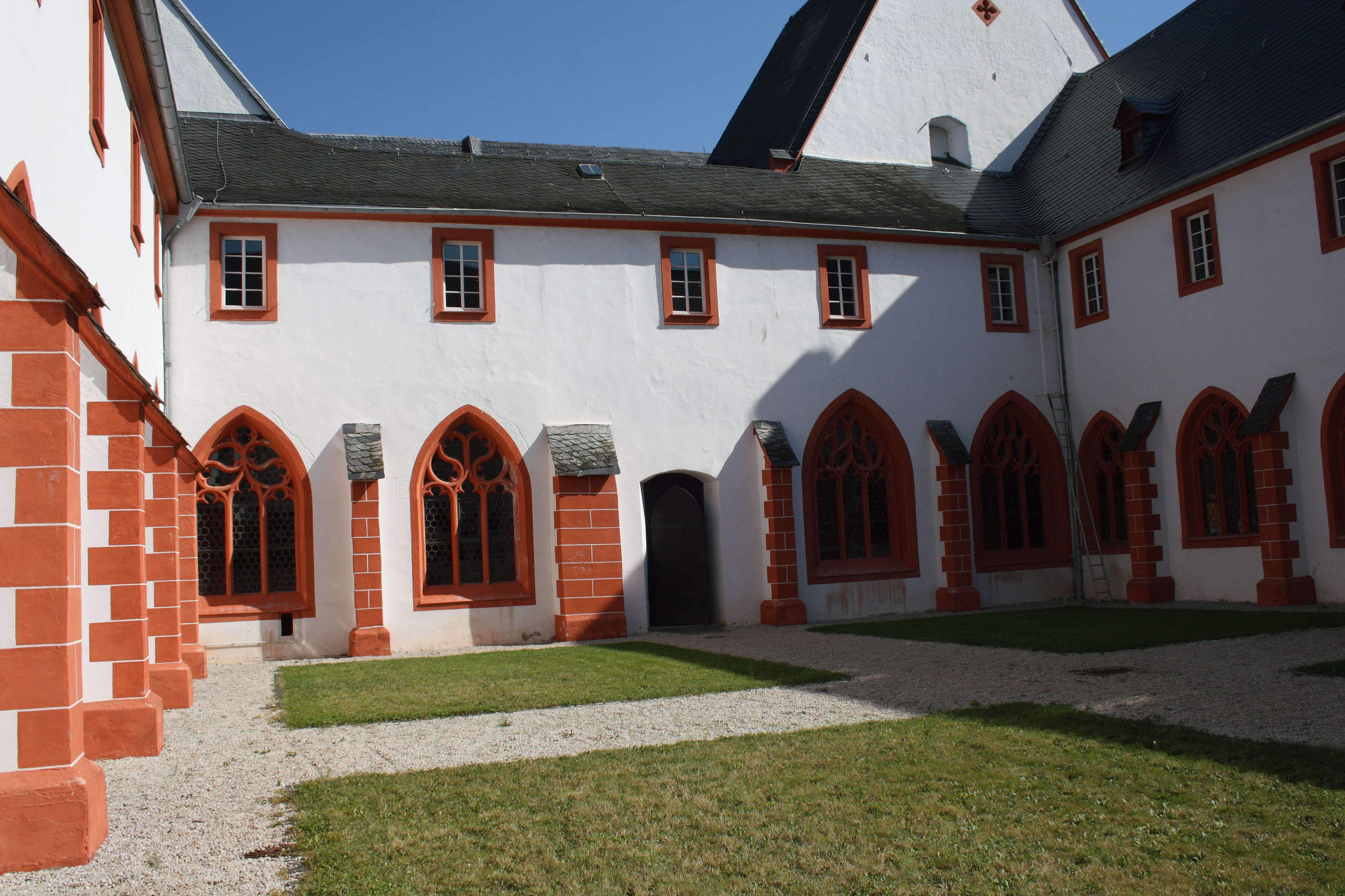 St. Nikolaus-Hospital (Cusanusstift) in Bernkastel-Kues im Landkreis Bernkastel-Wittlich (Rheinland-Pfalz), Innenhof des Kreuzgangs